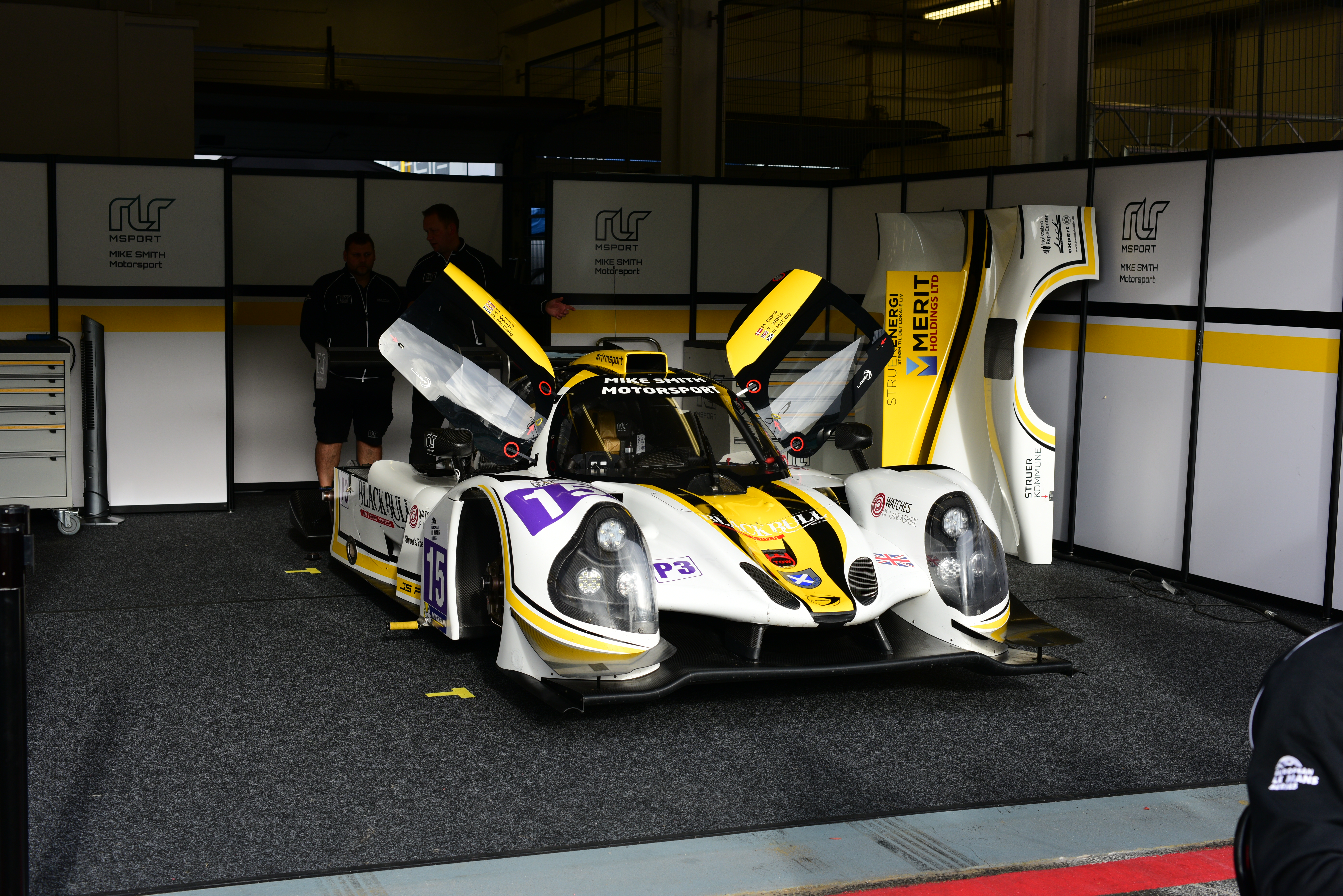 ELMS - 2016 - 4 Horas Estoril - Portugal